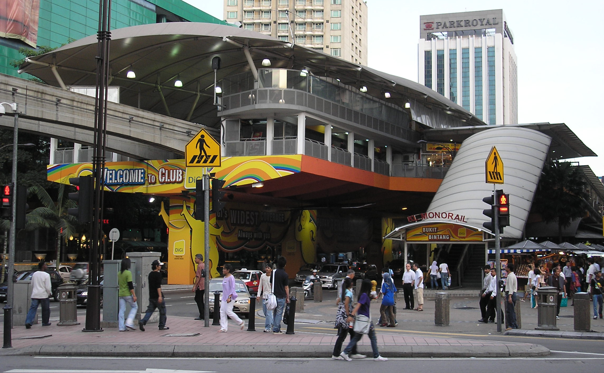 The Bukit Bintang station (Kuala Lumpur Monorail) (exterior), Kuala Lumpur, Malaysia.